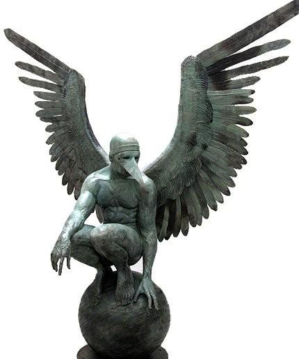 Ángel Persélidas Monumental 2009 Bronce 256 x 244 x 120 cms. Escultura del mexicano Jorge Marín